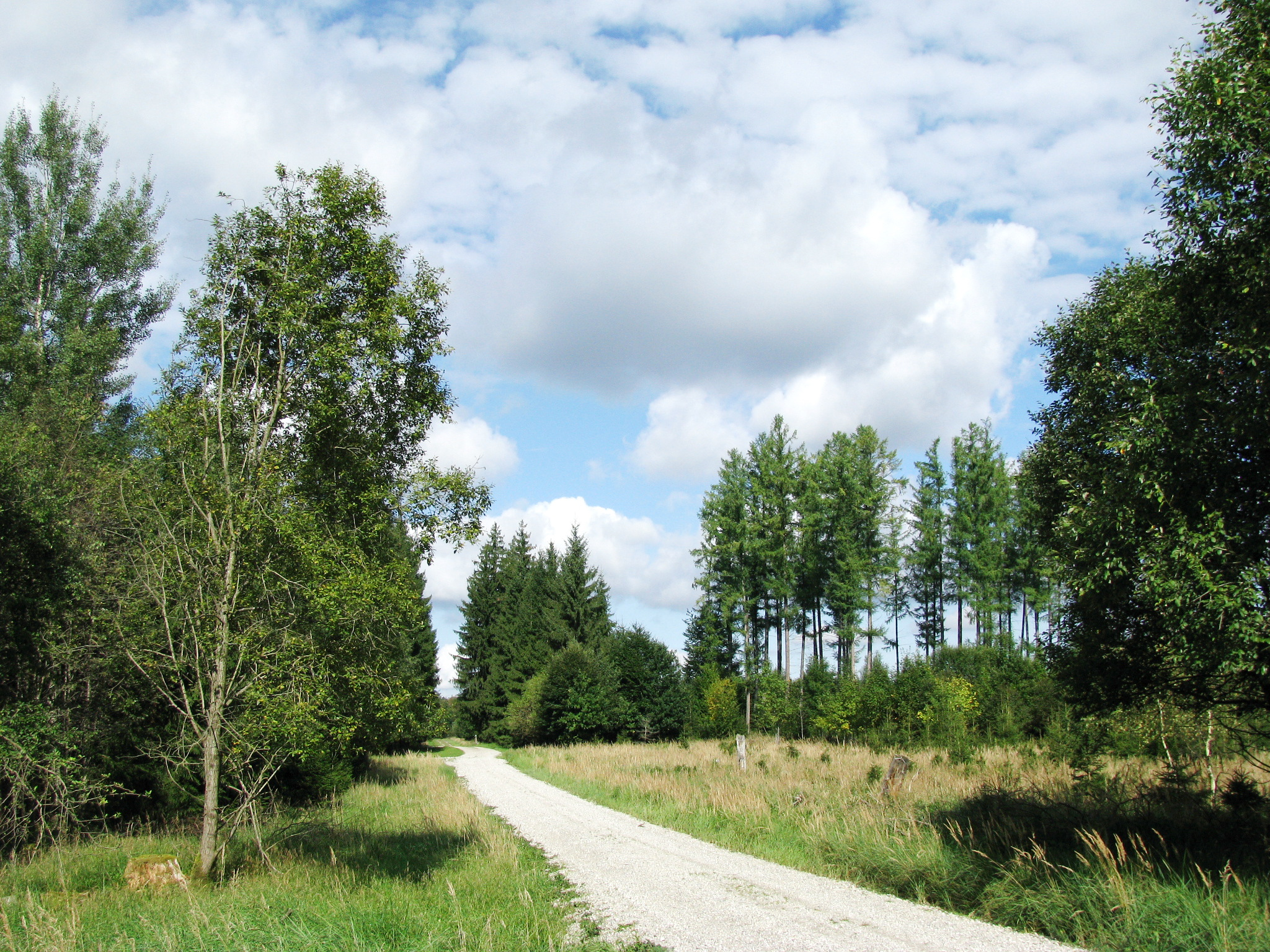 Preysinggeräumt im Forstenrieder Park, zwischen Theresien- und Karolinengeräumt, Blickrichtung nach Nordwest; links die Abzweigung zur Ottertalstraße